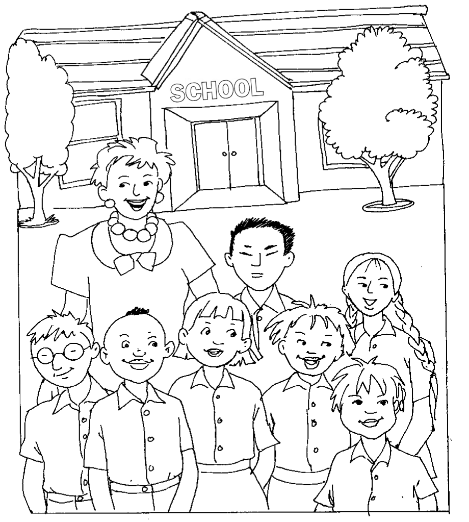 ne shkolle me shoket e klases